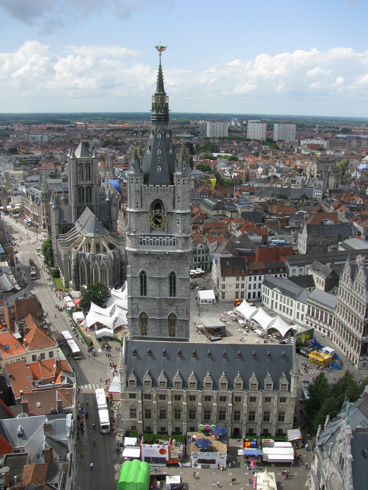 Ghent